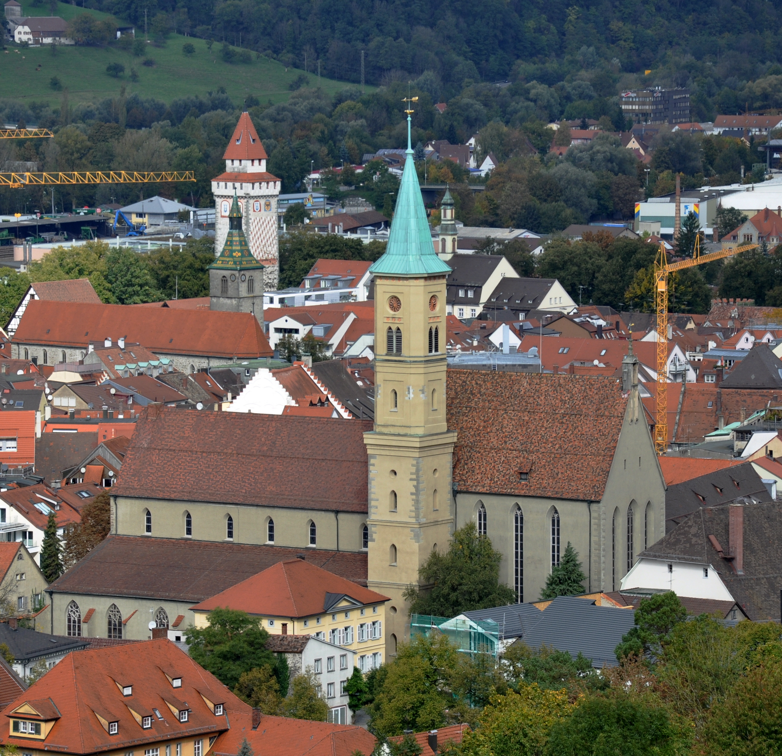 Ravensburg, Evangelische Stadtkirche (und Jodkoskirche sowie Gemalter Turm), von St Christina aus gesehen